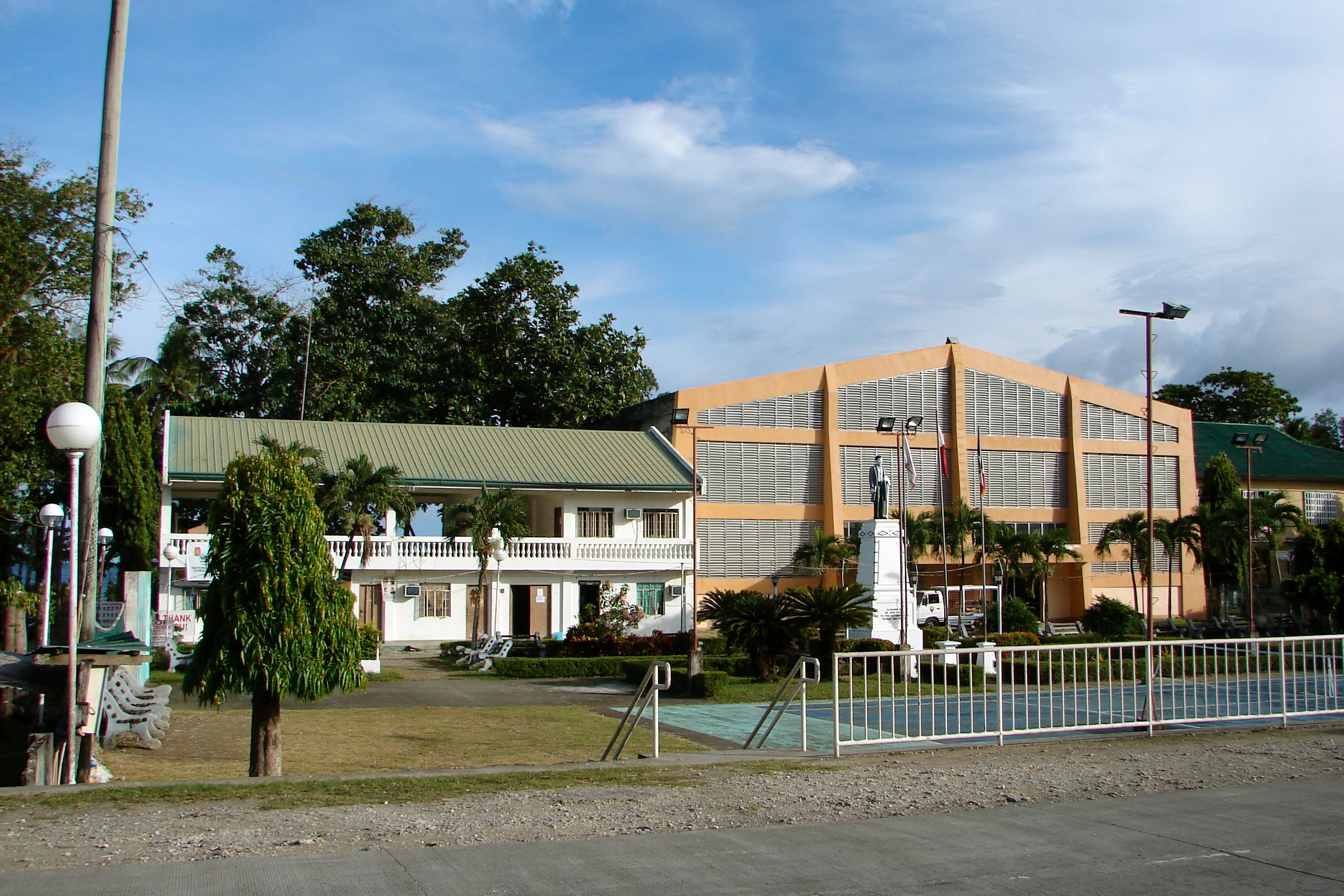 Duero, Bohol, Philippines